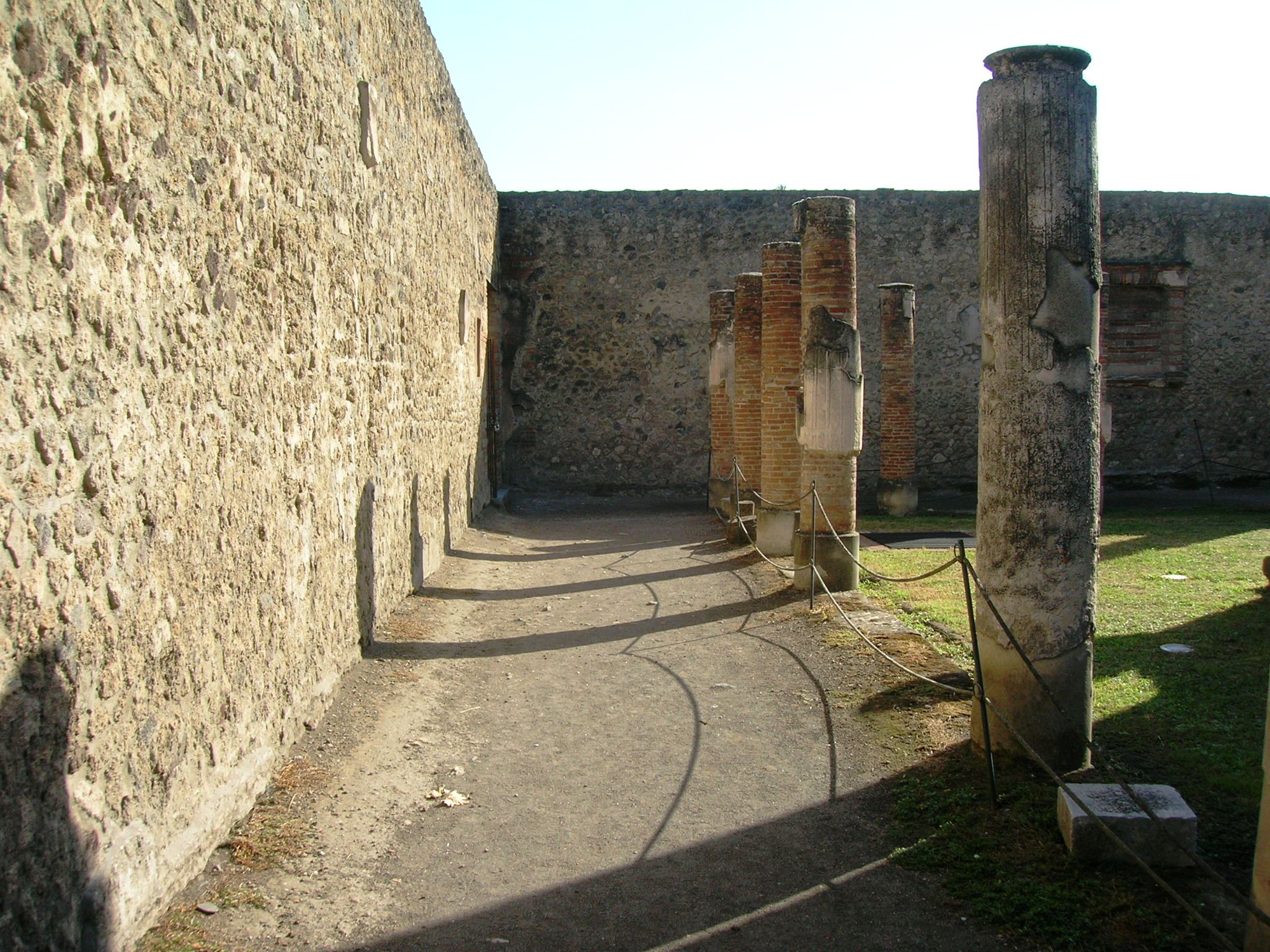 Tempio di Iside